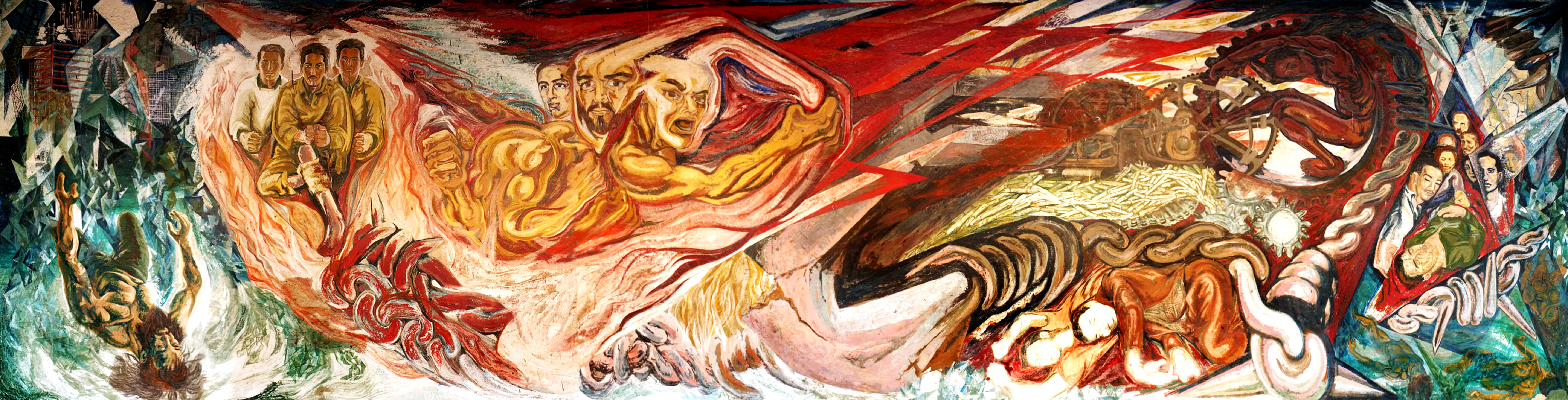 foto del mural revolución cubana de Electa Arenal